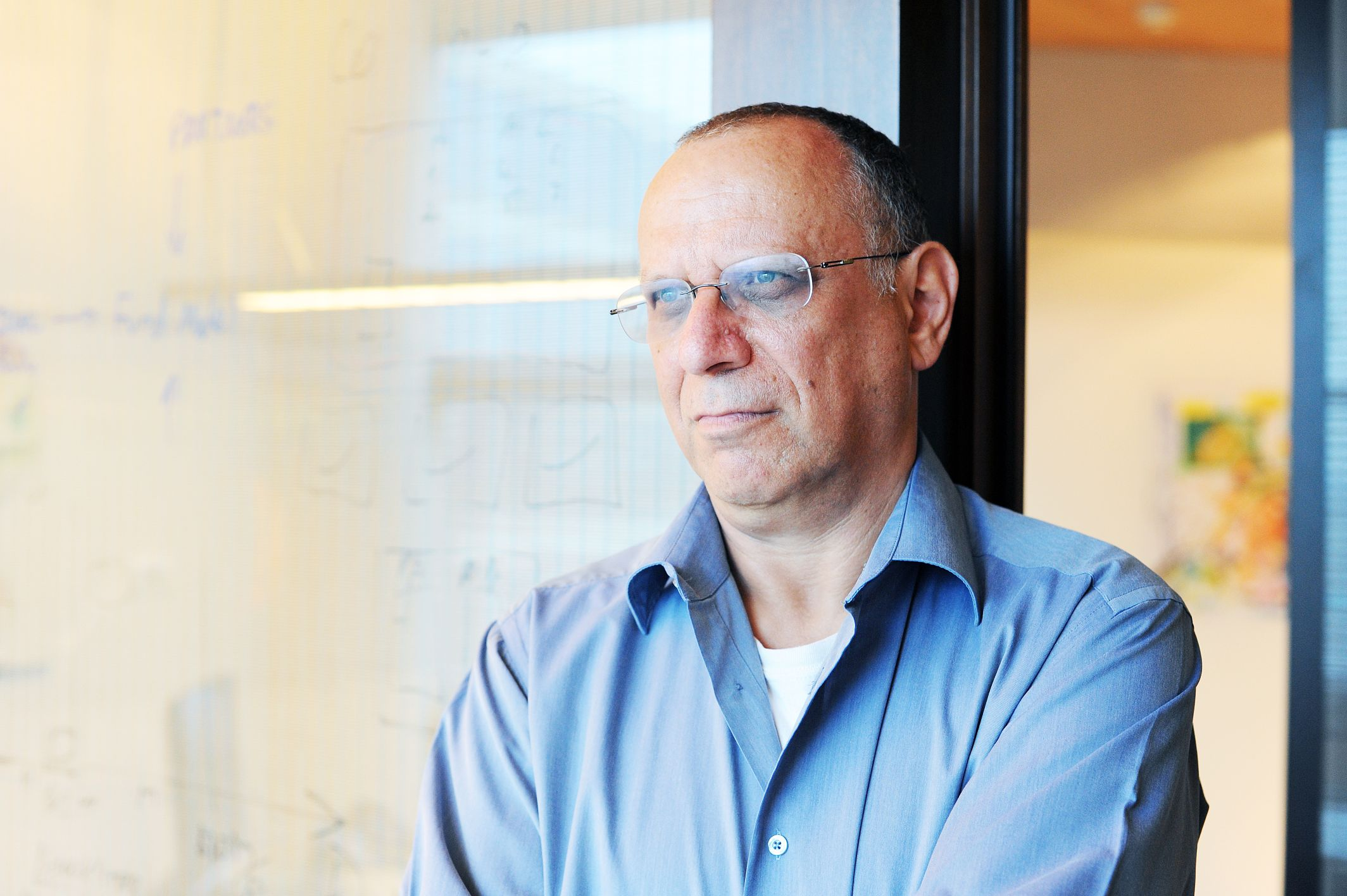 דב מורן